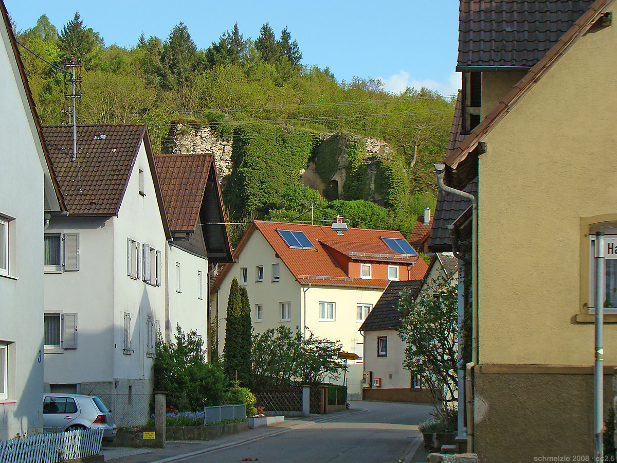 Überreste der Burg Zuzenhausen